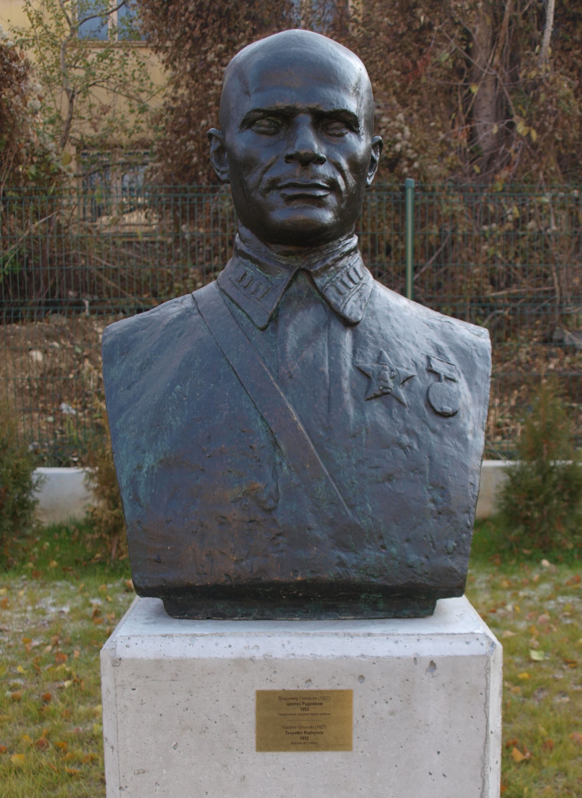 Скулптури в парка на Музея на социалистическото изкуство в София - Цвятко Радойнов.